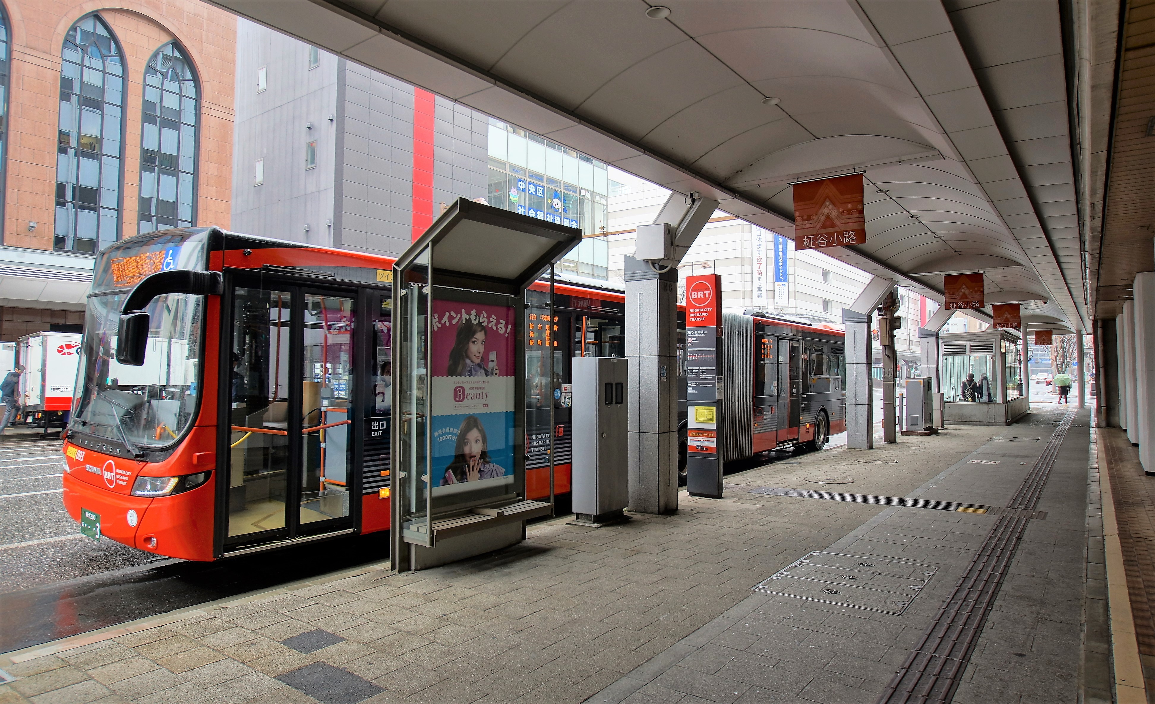 「古町」に停車中の連接車両（2017年3月）